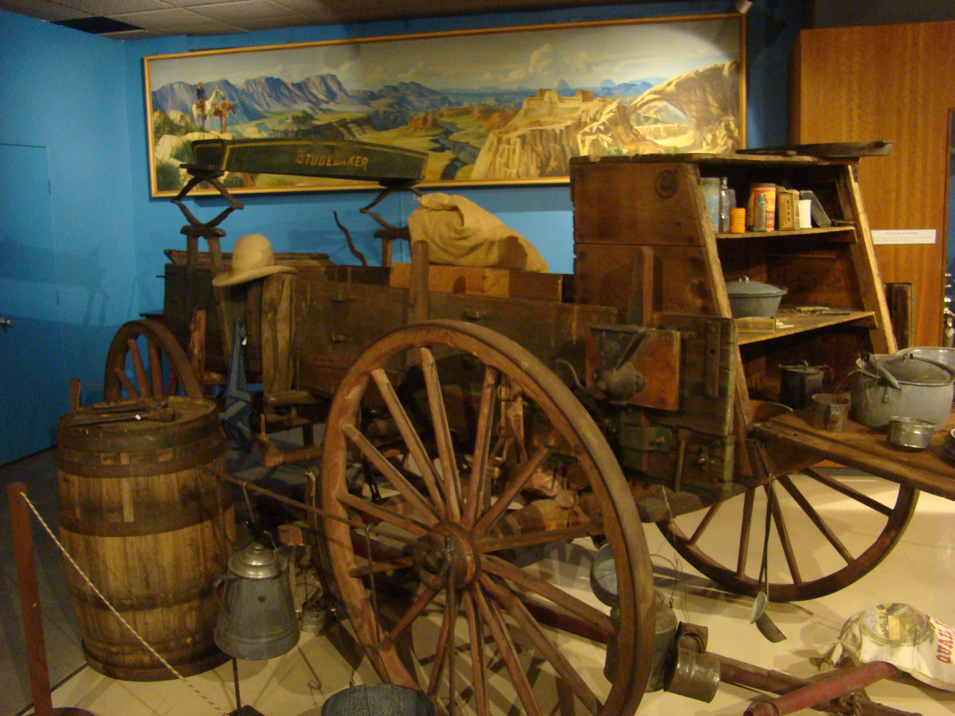 Collection Arizona History Museum de Tucson AZ.